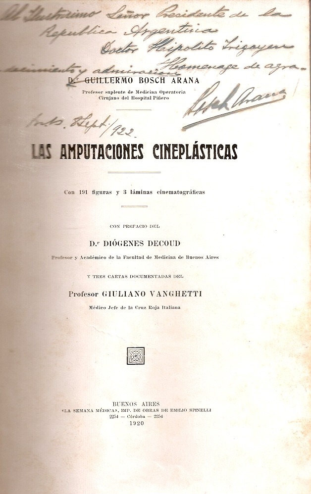 Ejemplar obsequiado al Dr. Hipólito Yrigoyen.